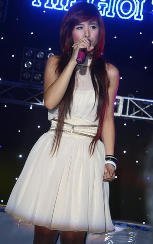 Ca sĩ Đông Nhi biểu diễn trong chương trình Thế Giới VPop